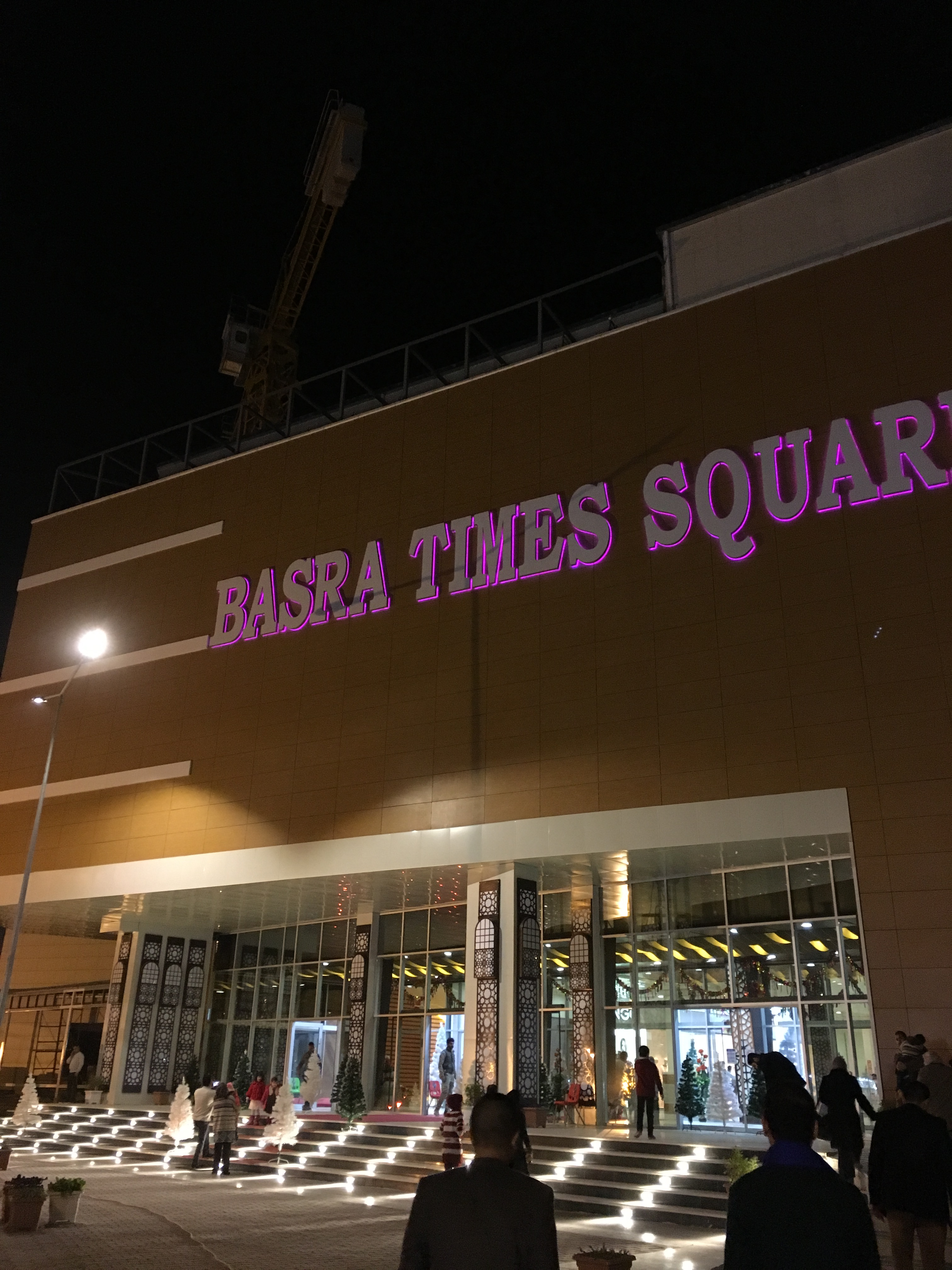 Basra times square shopping centre. مجمع البصرة تايمز سكوير في البصرة